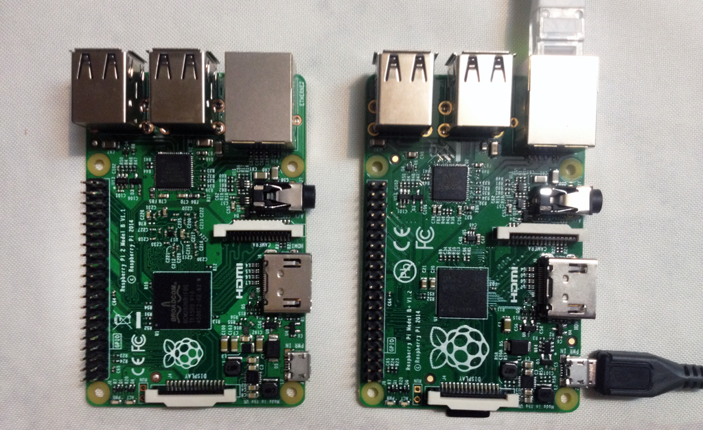 رزبری پای ۲ (سمت چپ) و رزبری پای مدل بی‌پلاس (راست). تفاوت ظاهری این دو مدل فقط در سمت پشت آنهاست که رزبری پای ۲ به علت رم زیادتر یک آی‌سی بیشتر دارد.